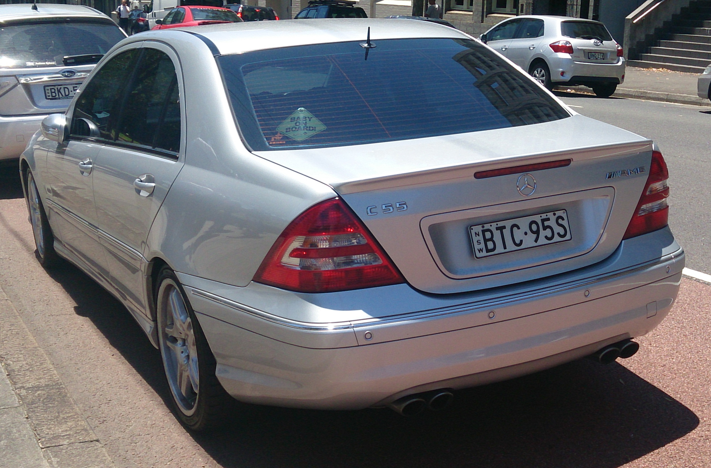 Mercedes-Benz C55 AMG